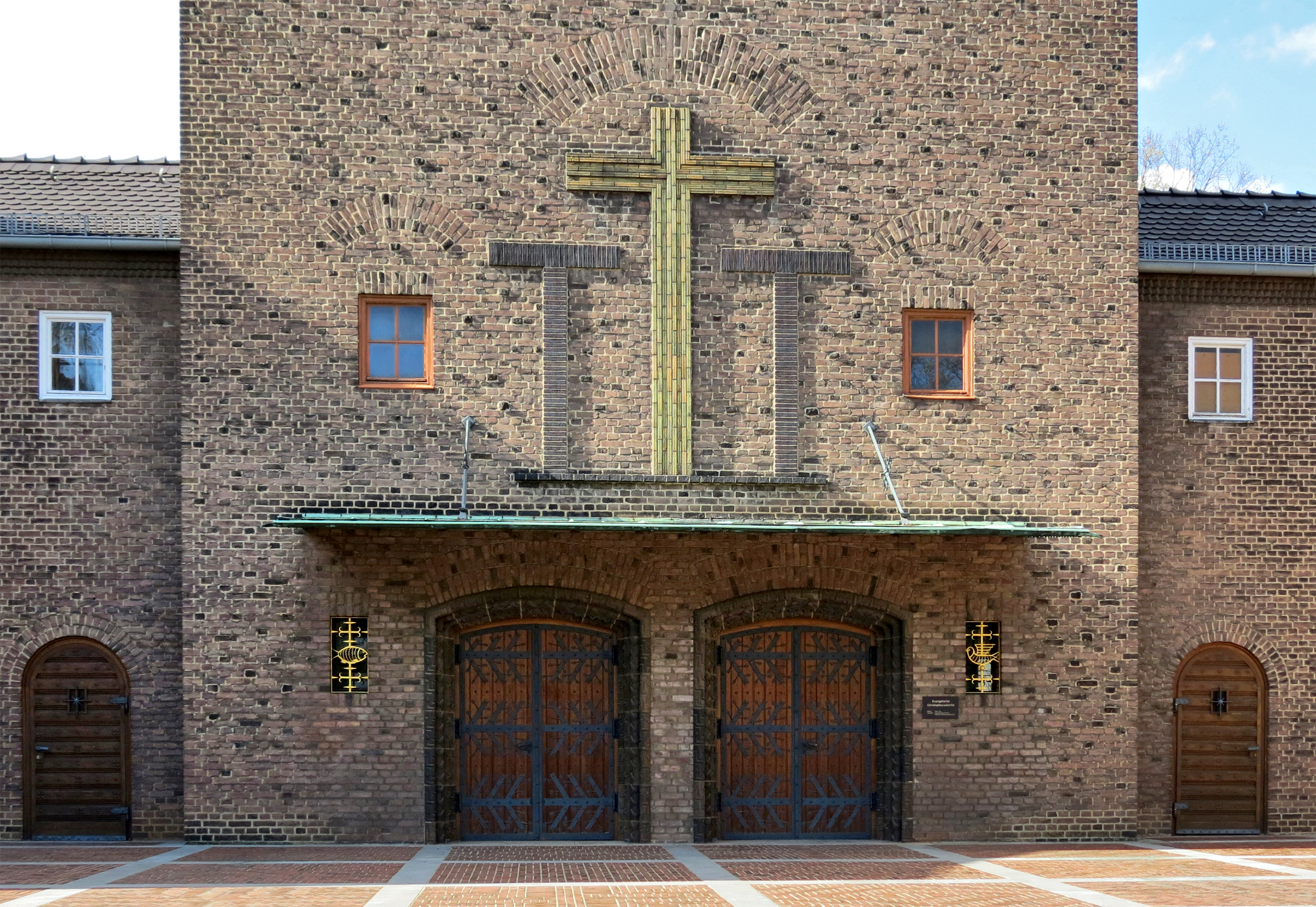 Christophoruskirche (Berlin-Siemensstadt)